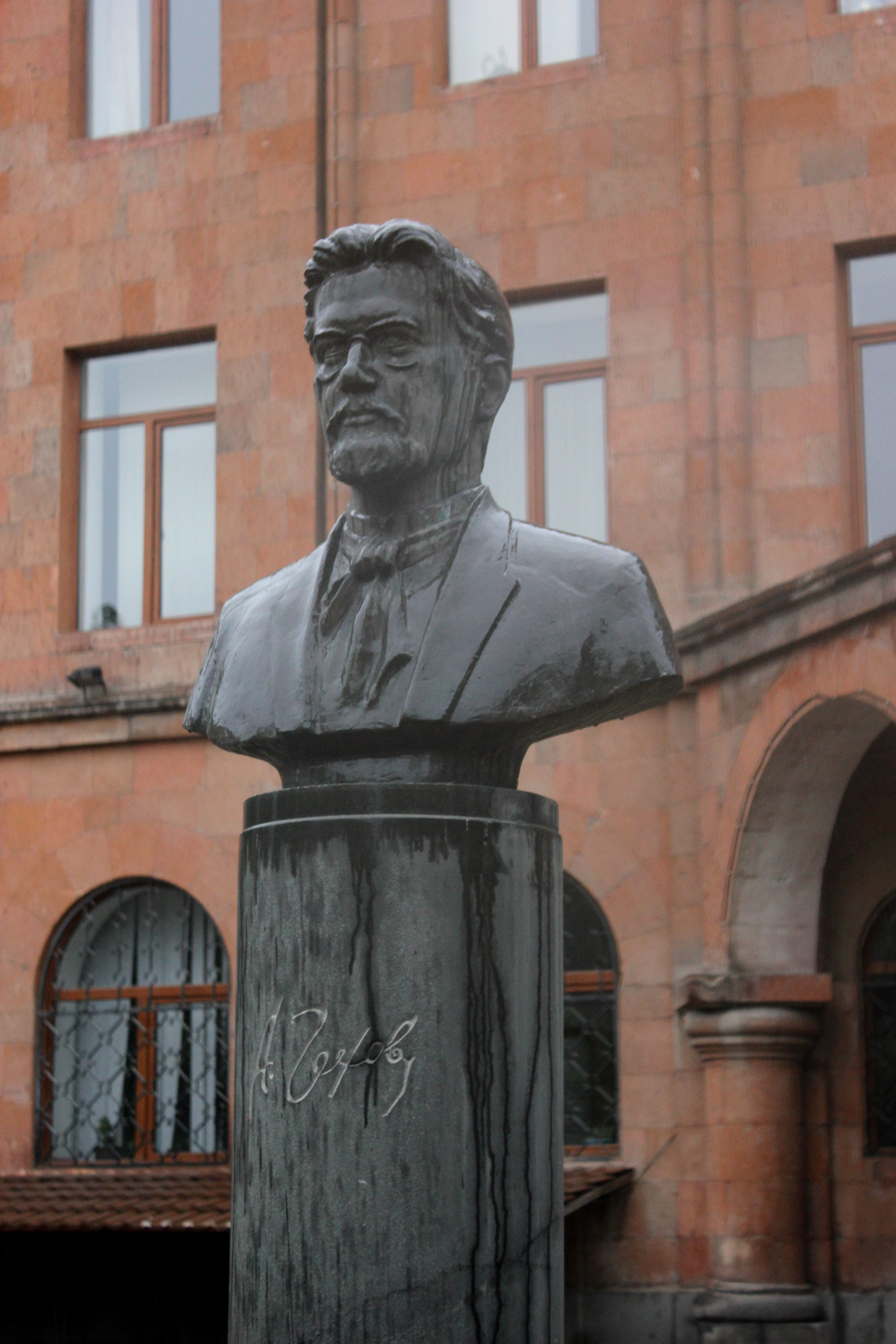 Չեխովի կիսանդրին , Երևանի թիվ 55 համանուն դպրոցի առջև, Քանդակագործ` Գ. Ահարոնյան, Ճարտարապետ է. Սարապյան 6/138